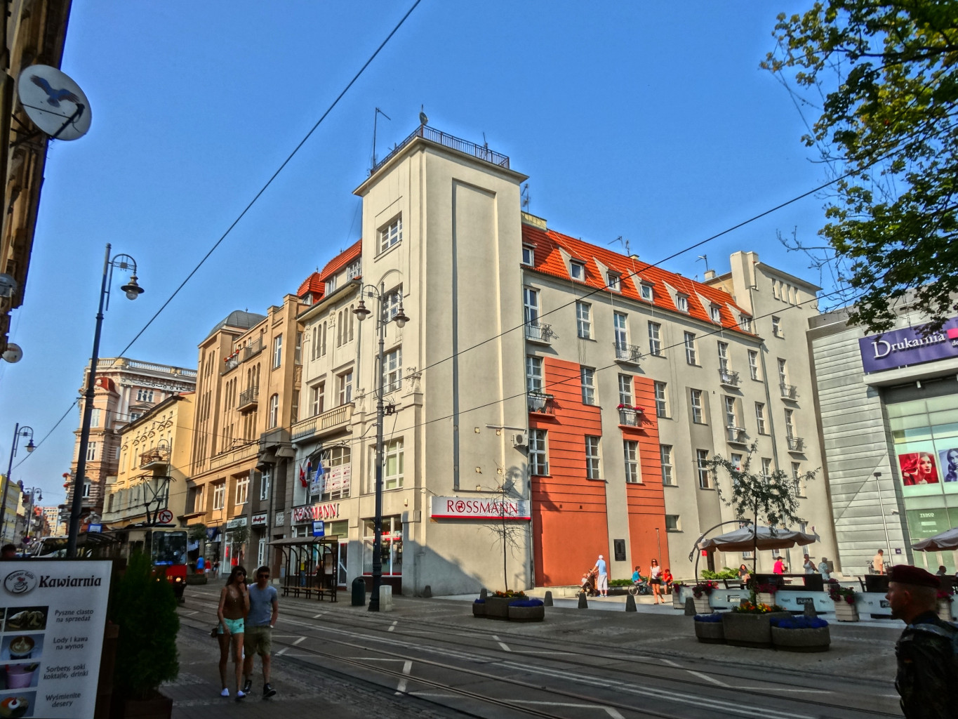 Ulica Gdańska w Bydgoszczy na odcinku między ul. Jagiellońską, a ul. Dworcową